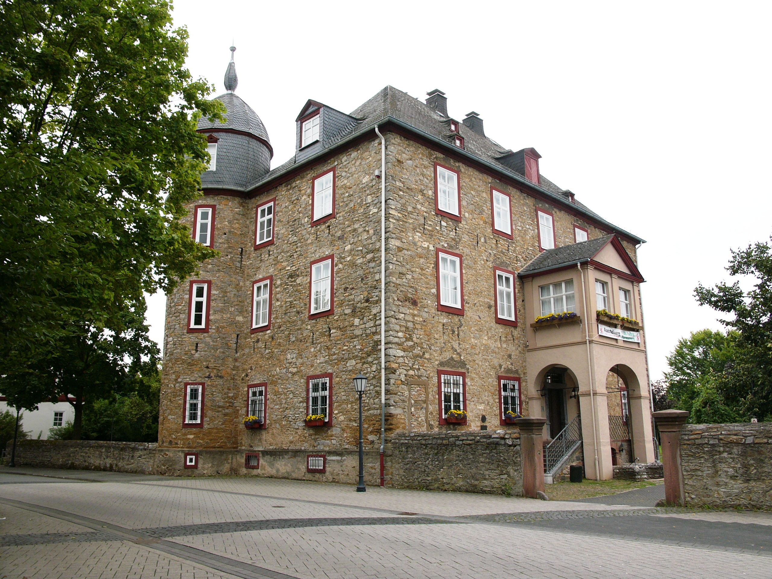 Das Werdorfer Schloss in Aßlar-Werdorf (Lahn-Dill-Kreis, Hessen)